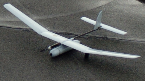 Skylark 1